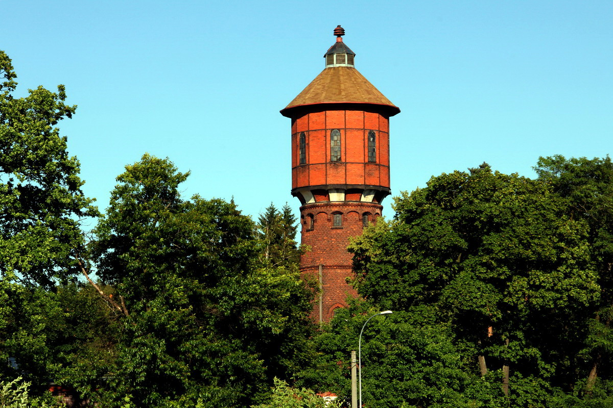 Bartoszyce, ul. Limanowskiego 1 - wieża ciśnień, 1904